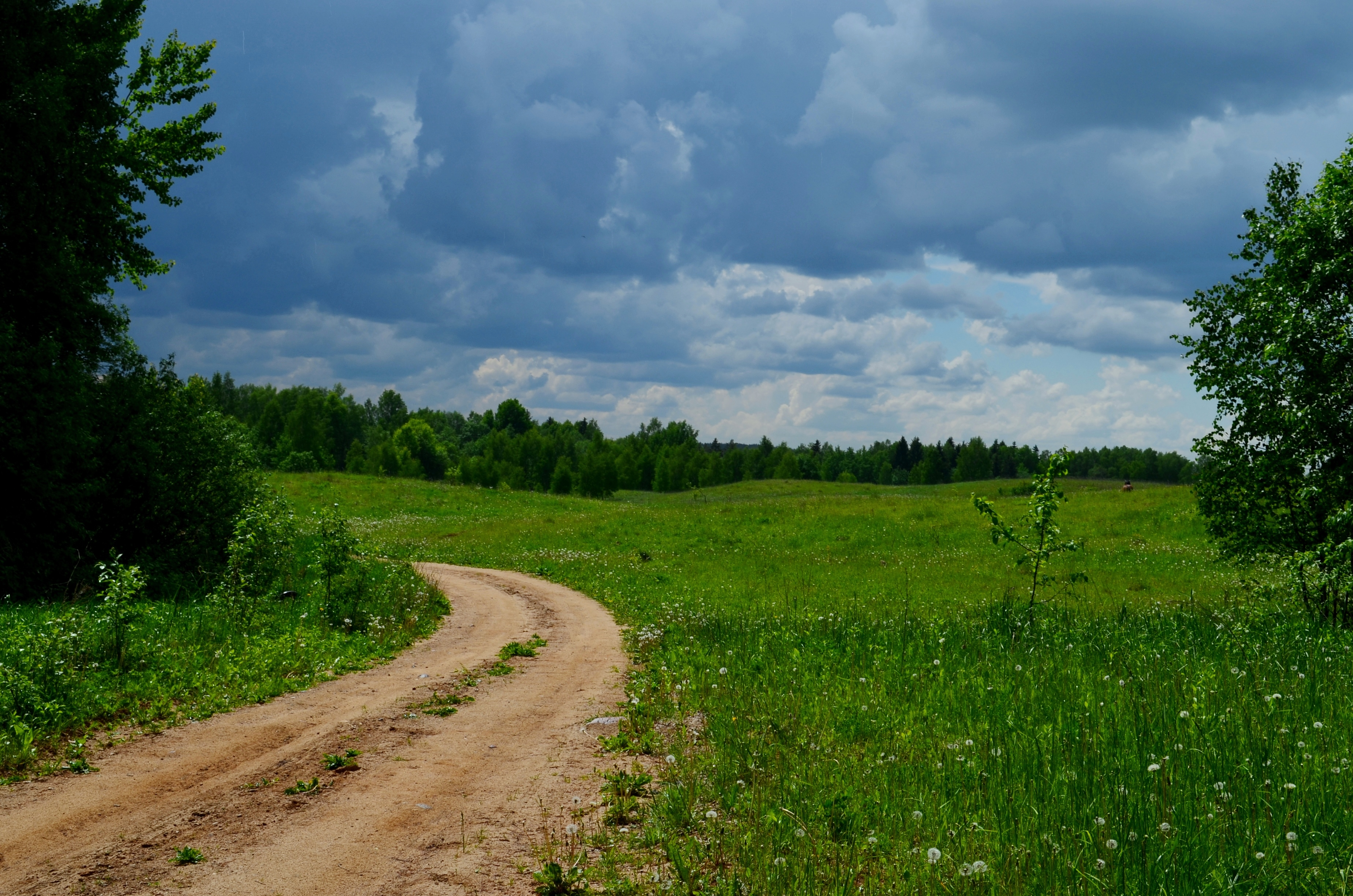 Medžiakalnio geomorfologinis draustinis, Vilniaus raj.